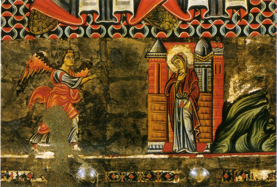 Maestro di greve, madonna di casale, dettaglio annunciazione.jpg